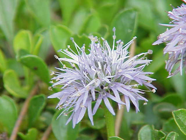 Species: Globularia cordifolia Family: Globulariaceae Image No. 1